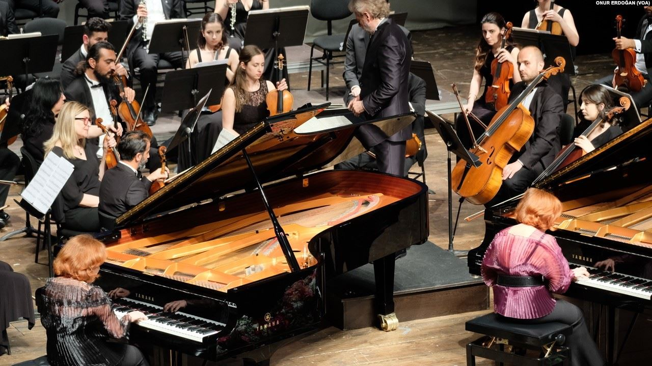 Pekinel kardeşler 18. Mersin Uluslararası Müzik Festivali'nde Mozart'ın 10. Piyano Konçertosu permonmansını sergiliyor.